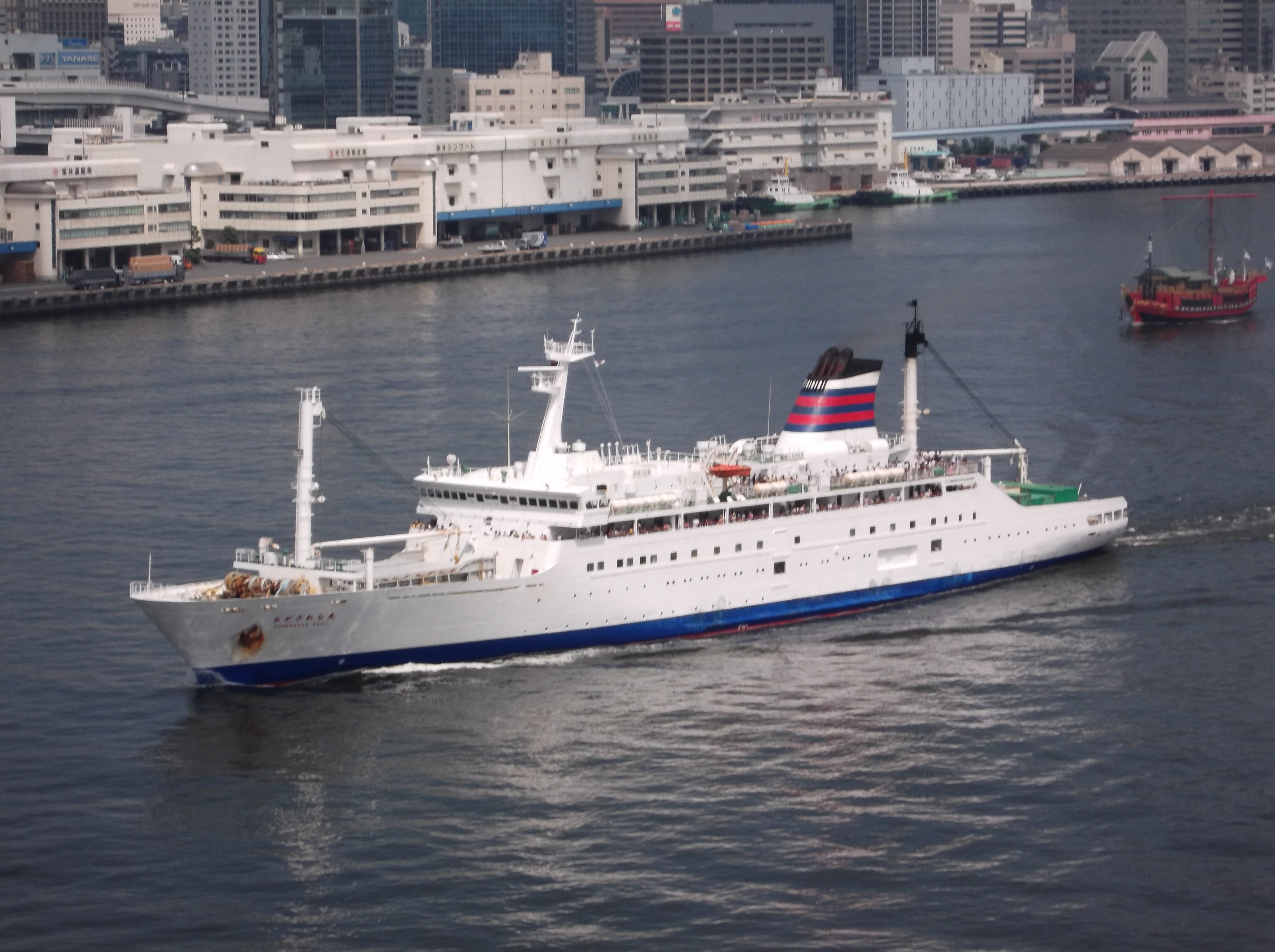 貨客船２代目おがさわら丸 20110812にレインボーブリッジから撮影